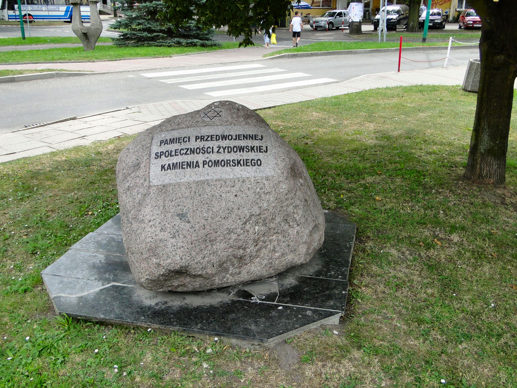 Głaz Pamięci Przedwojennej Społeczności Żydowskiej Kamienia Pomorskiego